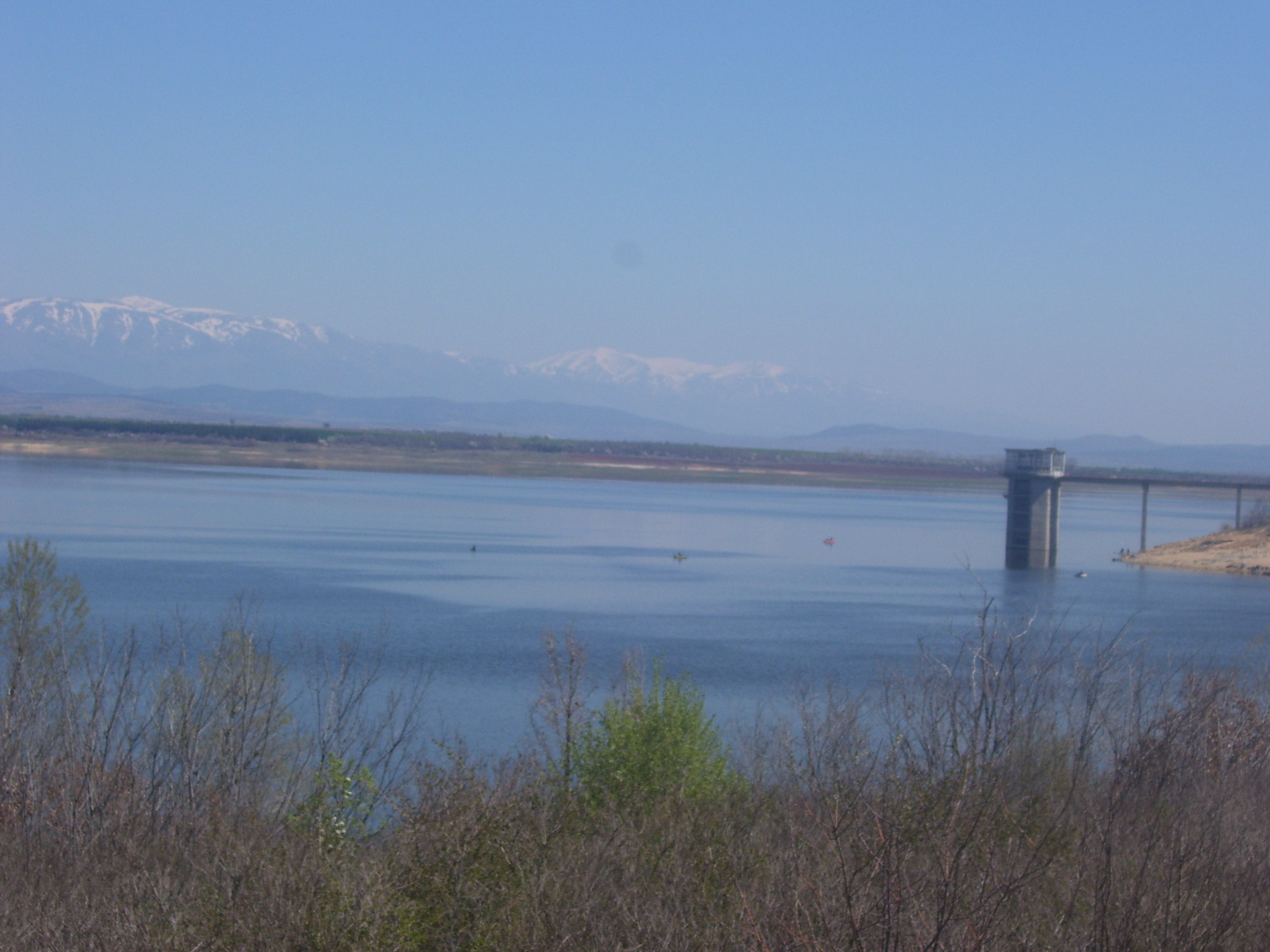 Язовир Пясъчник.